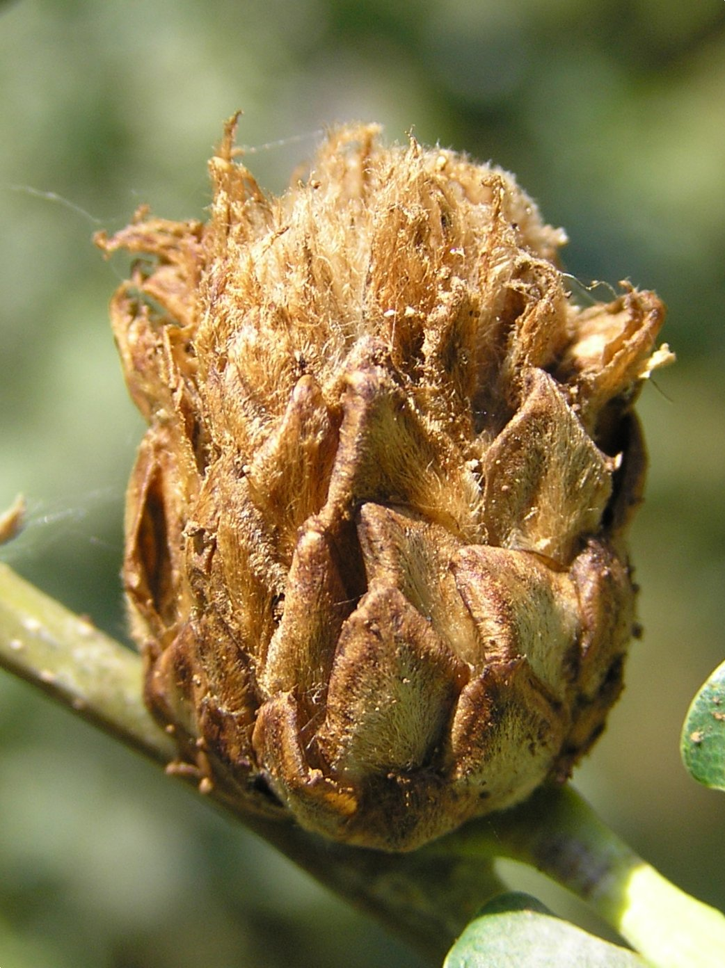 Andricus fecundator, Letyniec szysznica, Brok, Polska